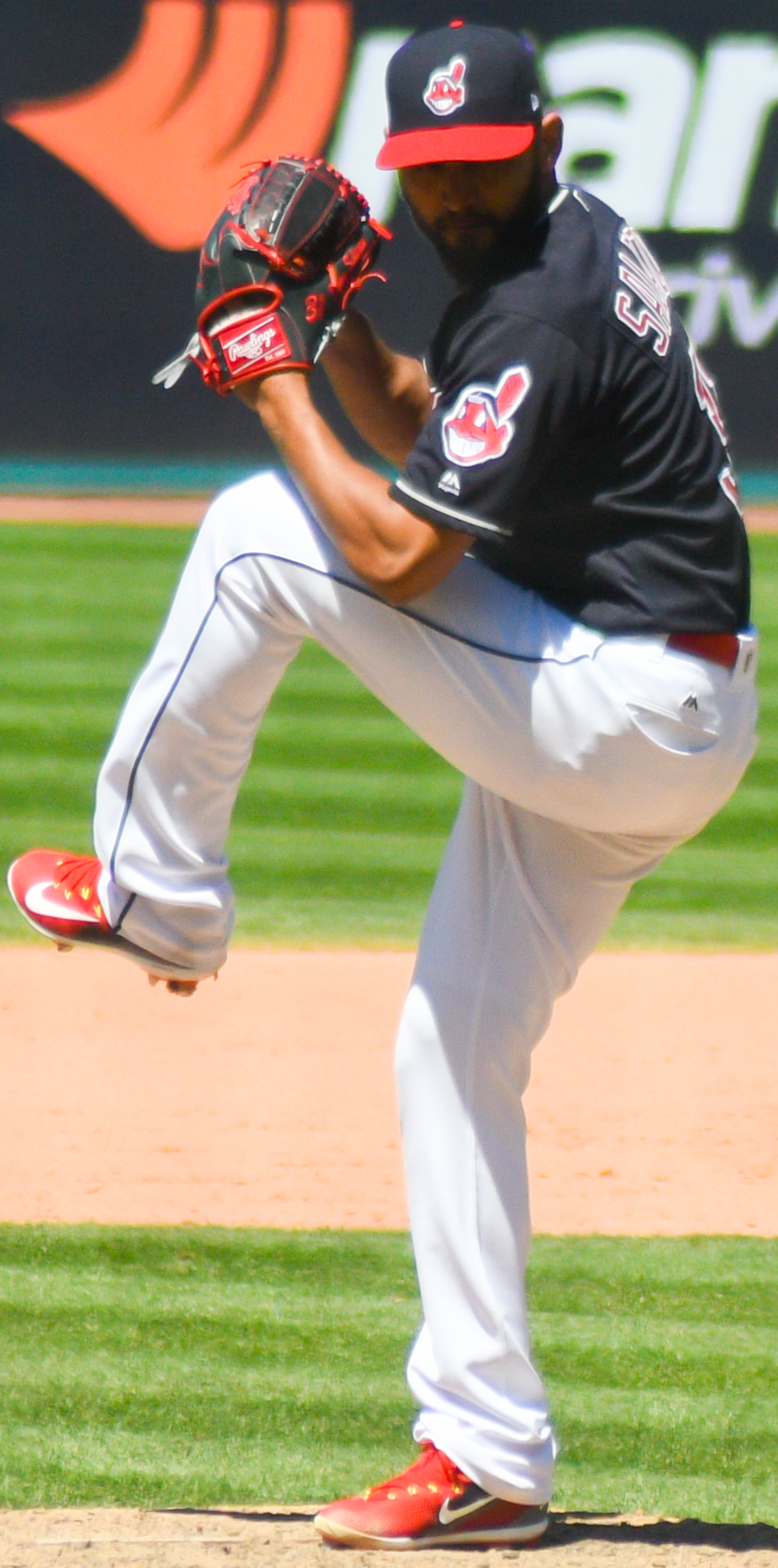 Danny Salazar